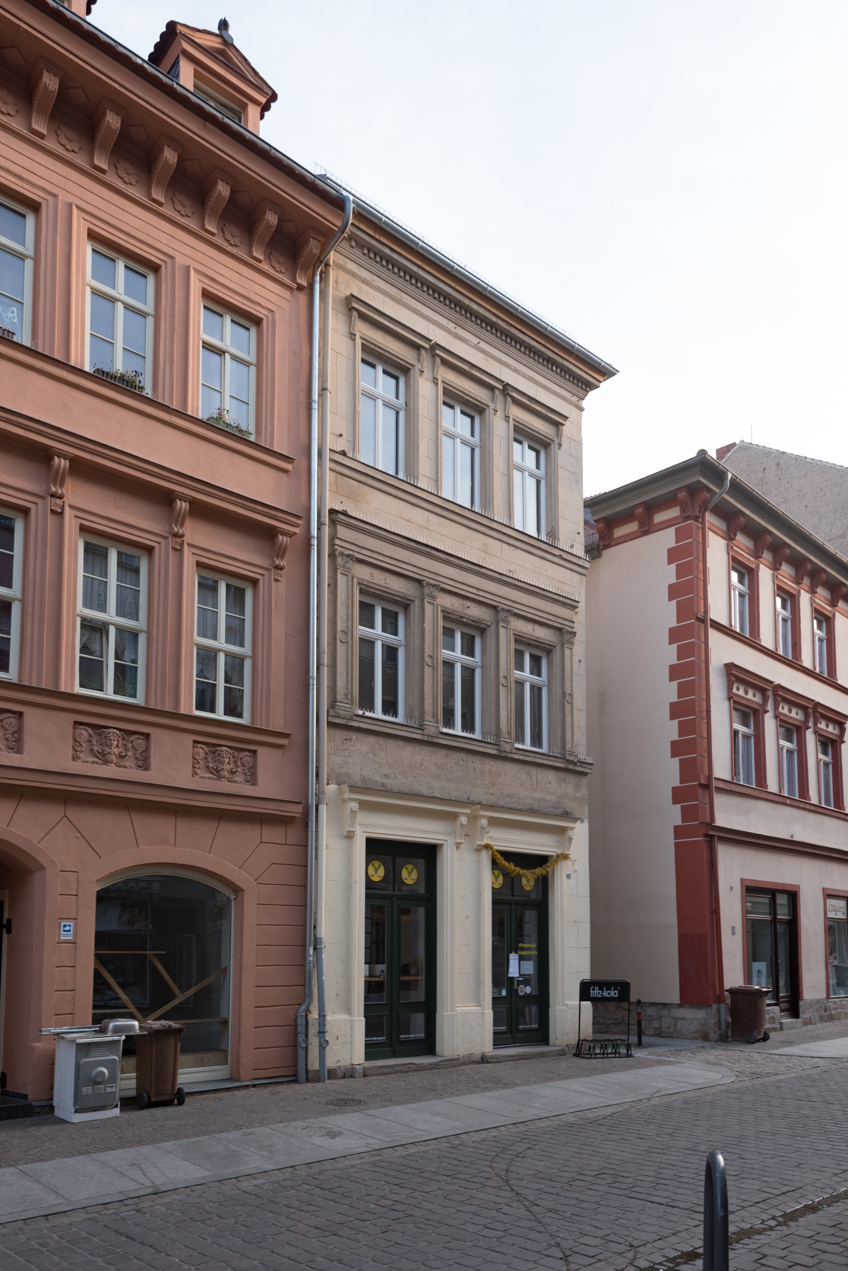 Naumburg (Saale), Jakobstraße 10